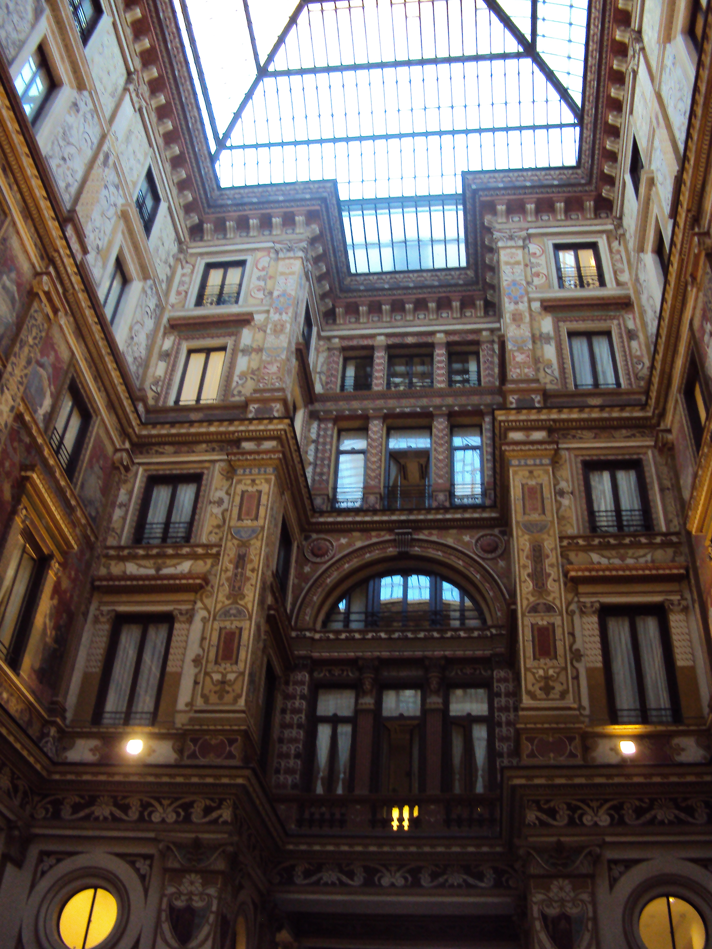 Galleria Sciarra, Roma